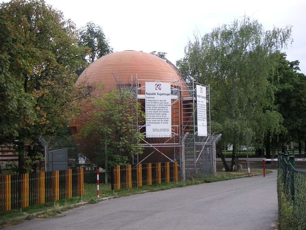 Kugelmugel im Prater, in Wien